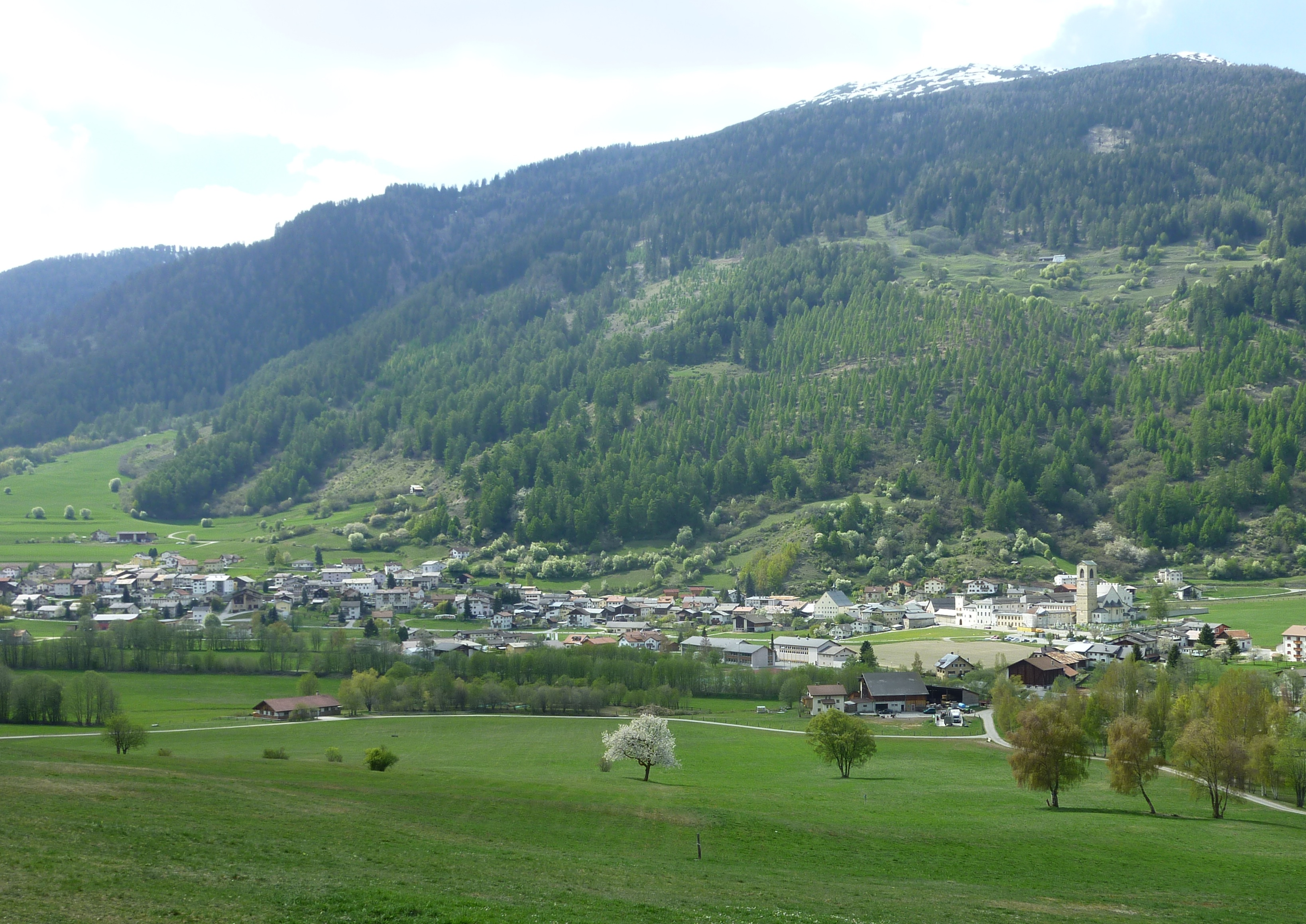 Müstair, rechts das Benediktinerkloster St. Johann